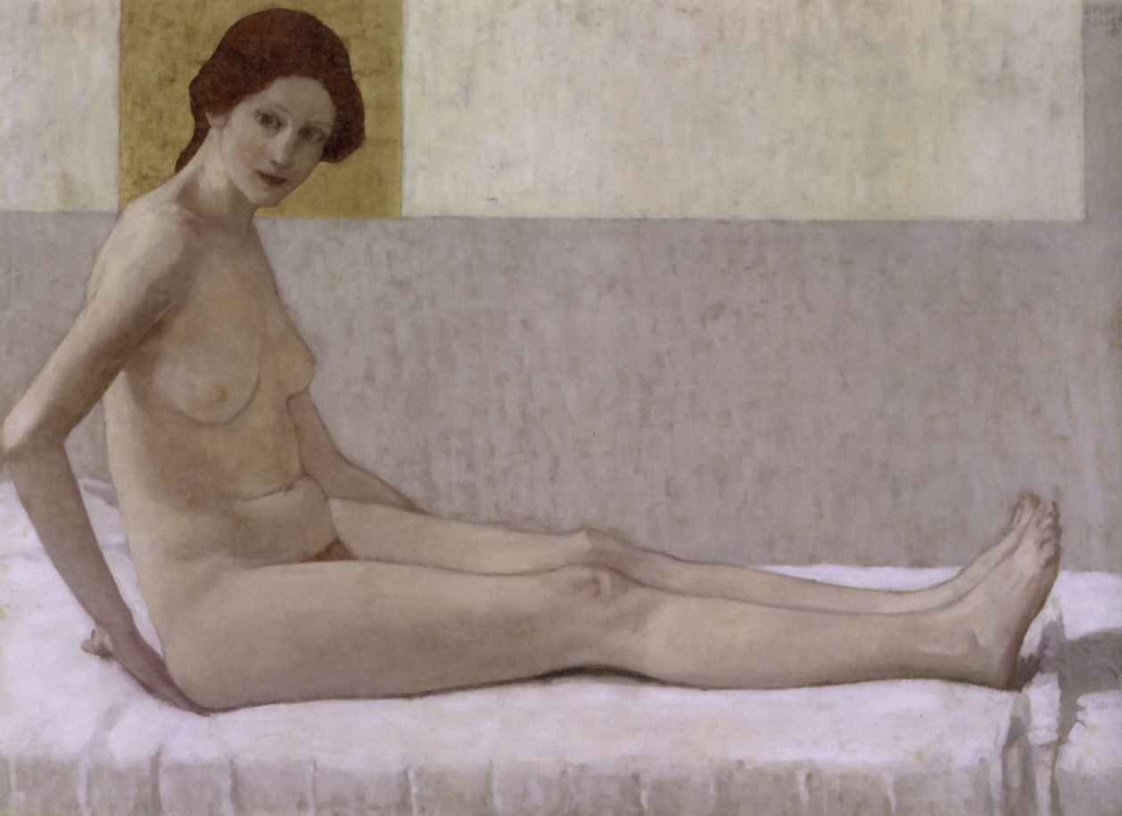 Sitzendelabel QS:Lde,"Sitzende"label QS:Lfr,"Nu assis"